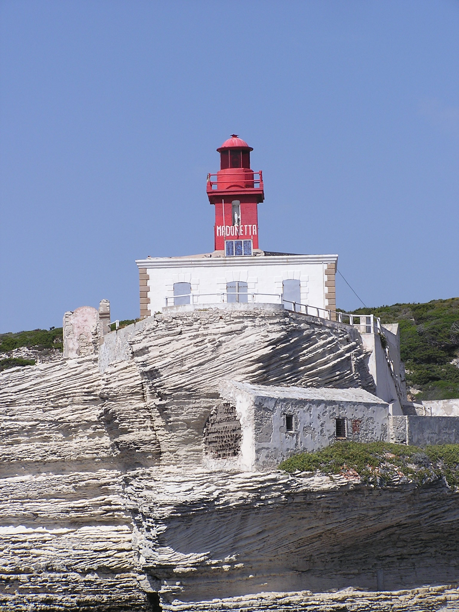 Phare de la Madonetta